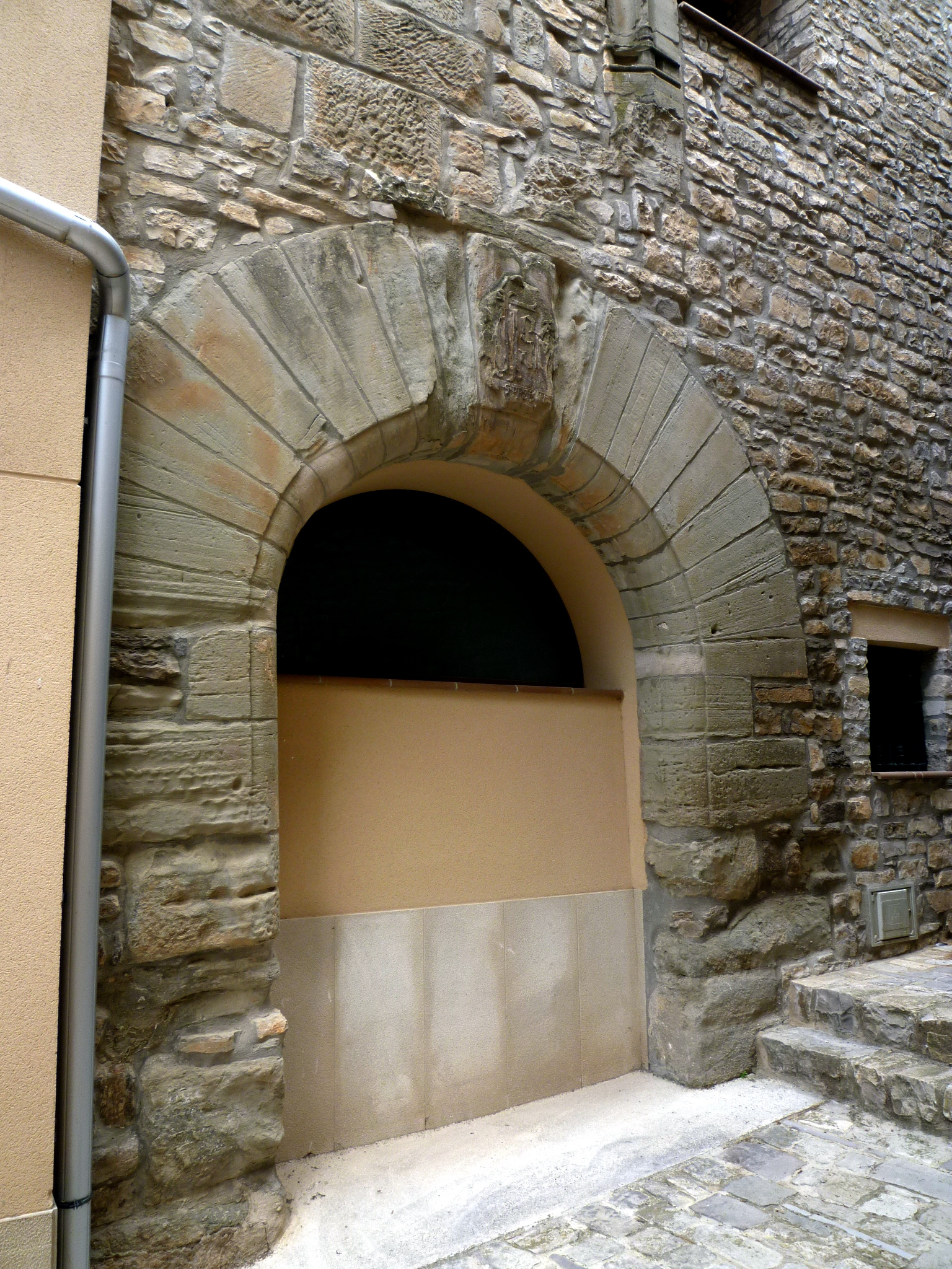 Cal Torreta de Freixenet de Segarra (Sant Guim de Freixenet): antic portal